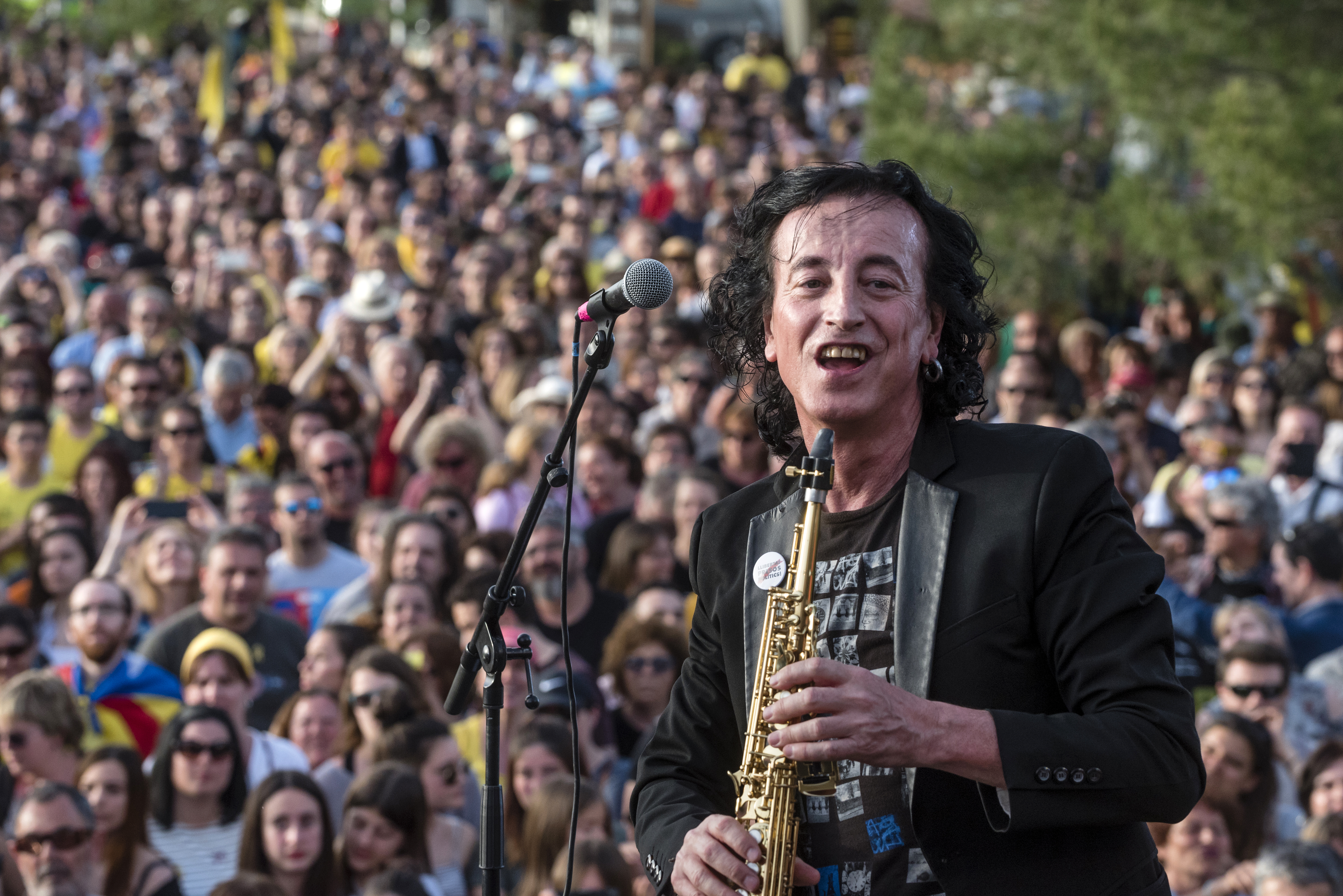 _DC74225